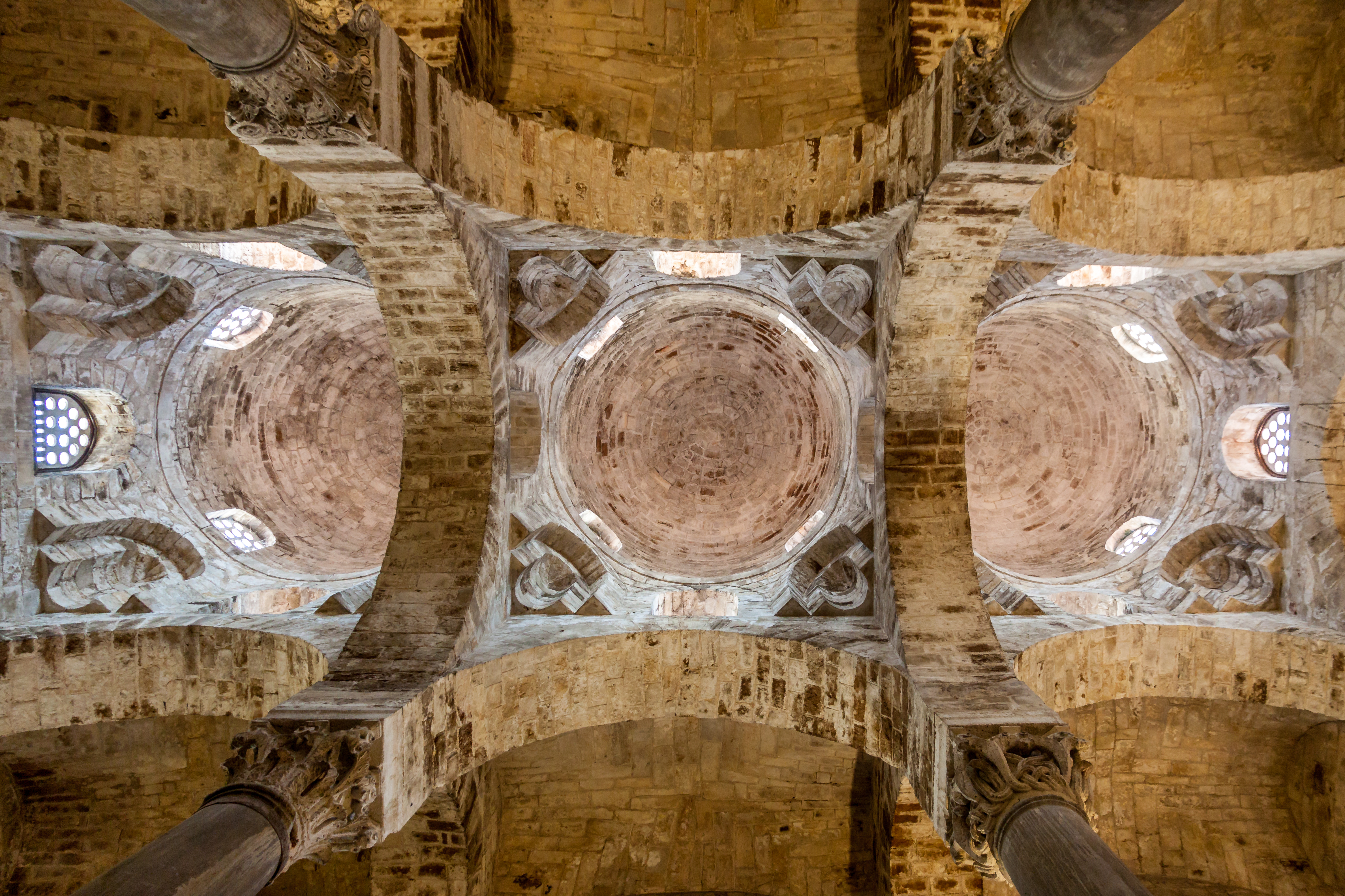 Kirche San Cataldo in Palermo. Die drei Kuppeln von Innen, ein Mosaik war nie vorhanden.